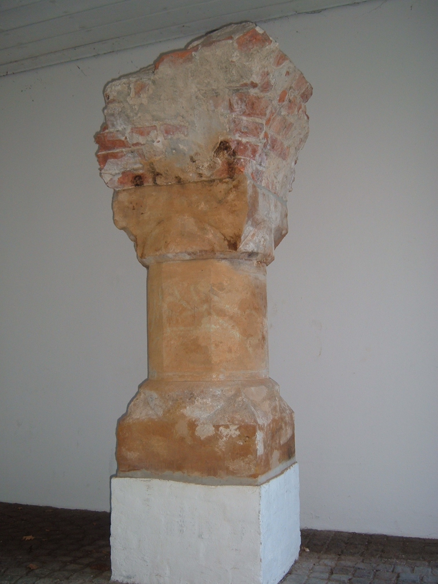 Fundamentreste des ersten Schloßes in Neumarkt in der Oberpfalz